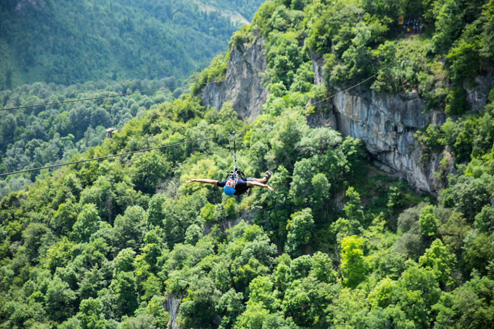 Լաստիվեր, զիփլայն